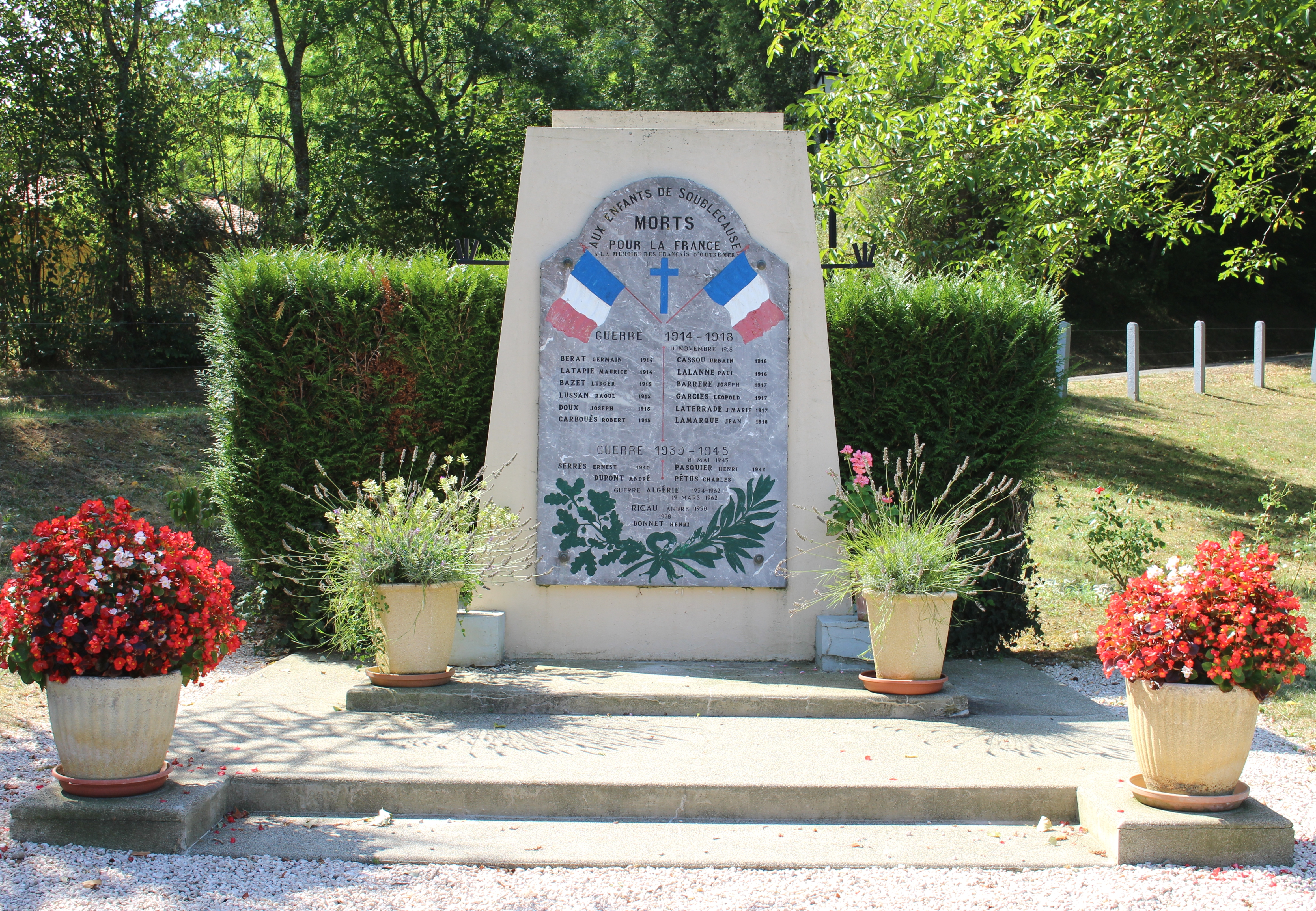 Monument aux morts de Soublecause (Hautes-Pyrénées)